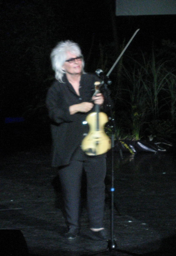 Catherine Lara au théâtre du "Préau" à Vire, Basse-Normandie, France.